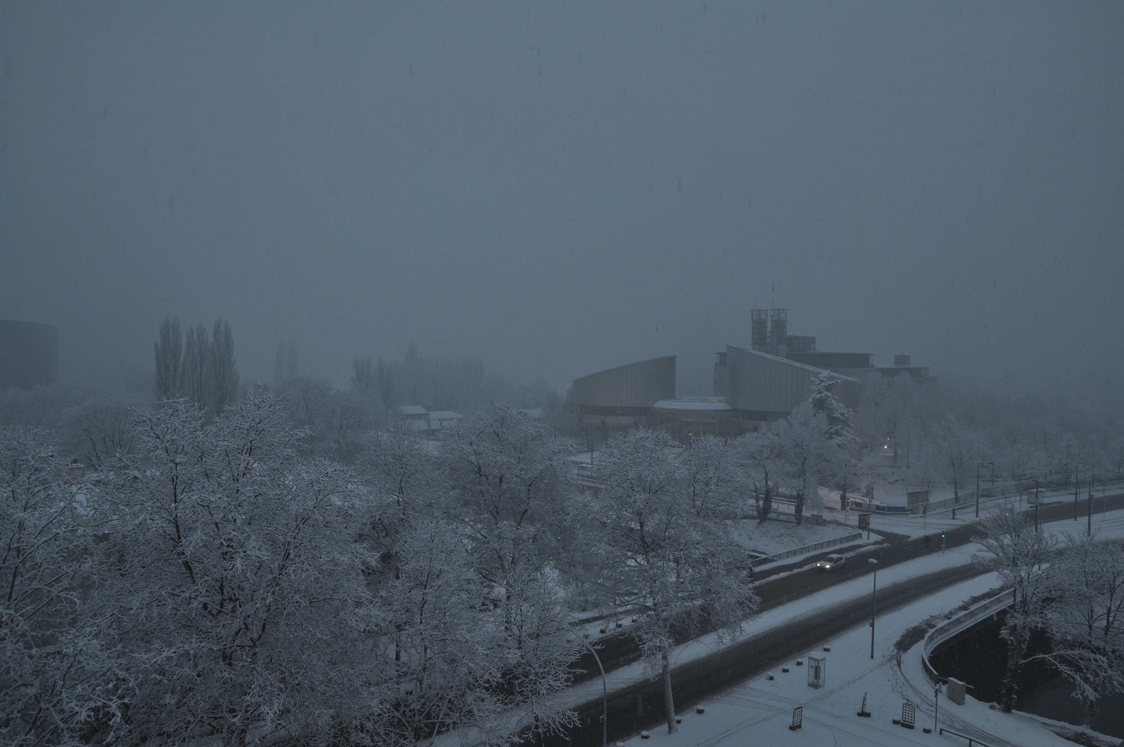 Cour européenne des droits de l'homme